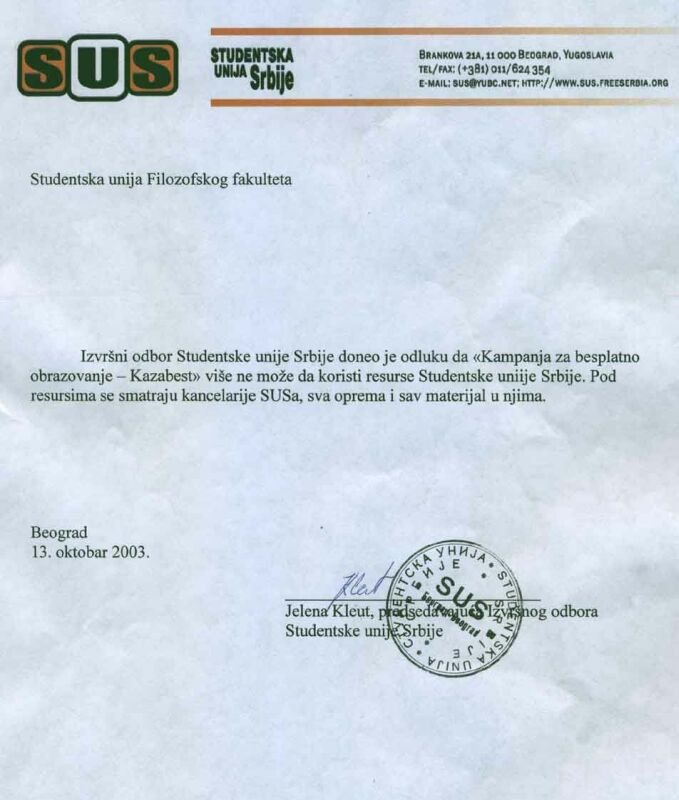 Odluka o izbacivanju kampanje za besplatno obrazovanje iz prostorija Studentske unije Srbije.